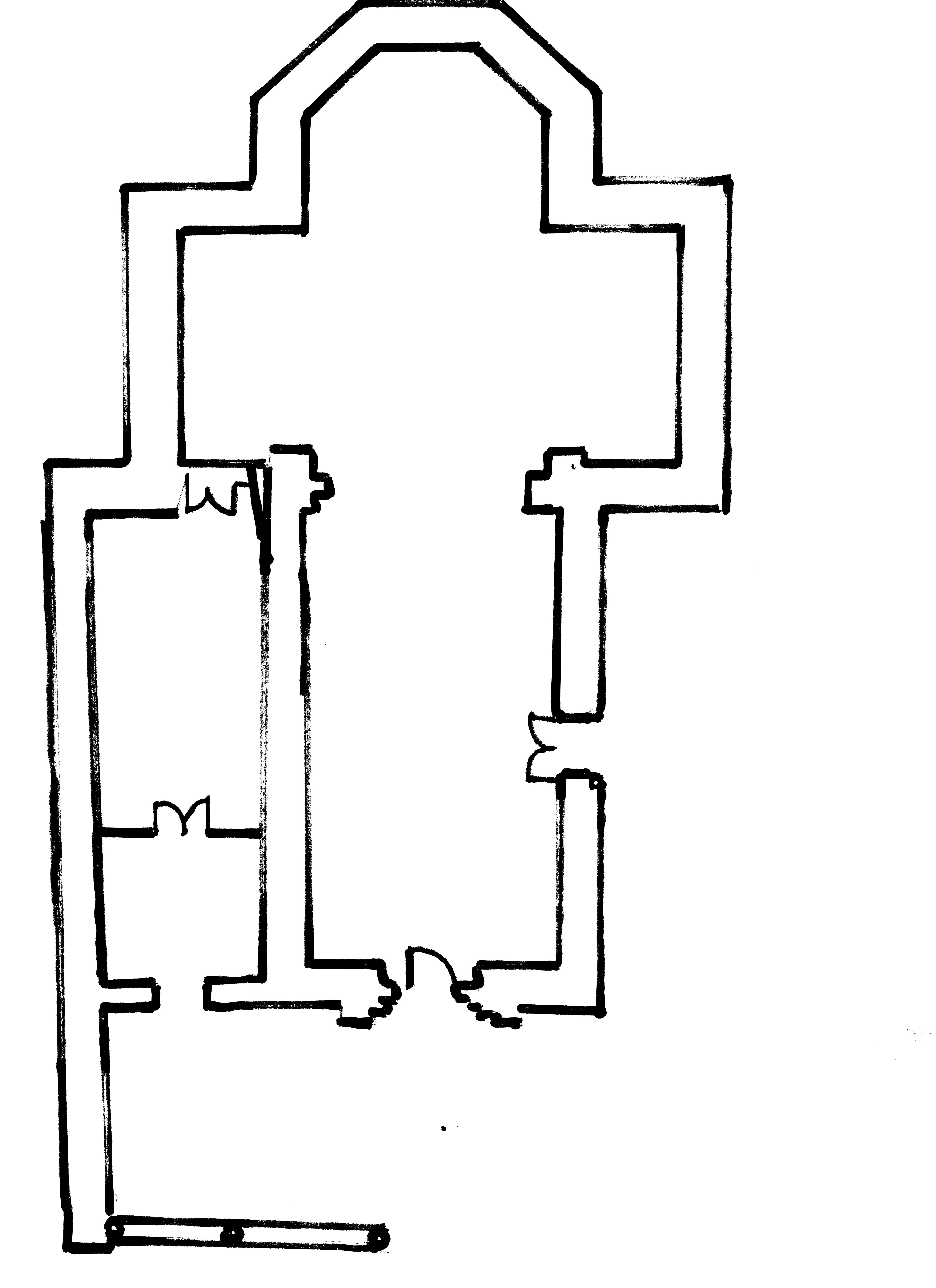 Planta del Santuario de Lugás. Simplificada.